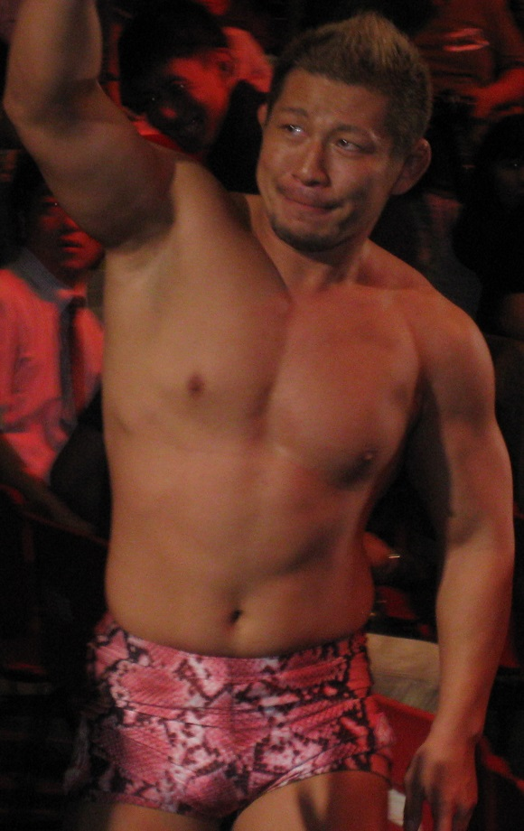 9月29日 神戸大会 「DESTRUCTION」 高橋裕二郎